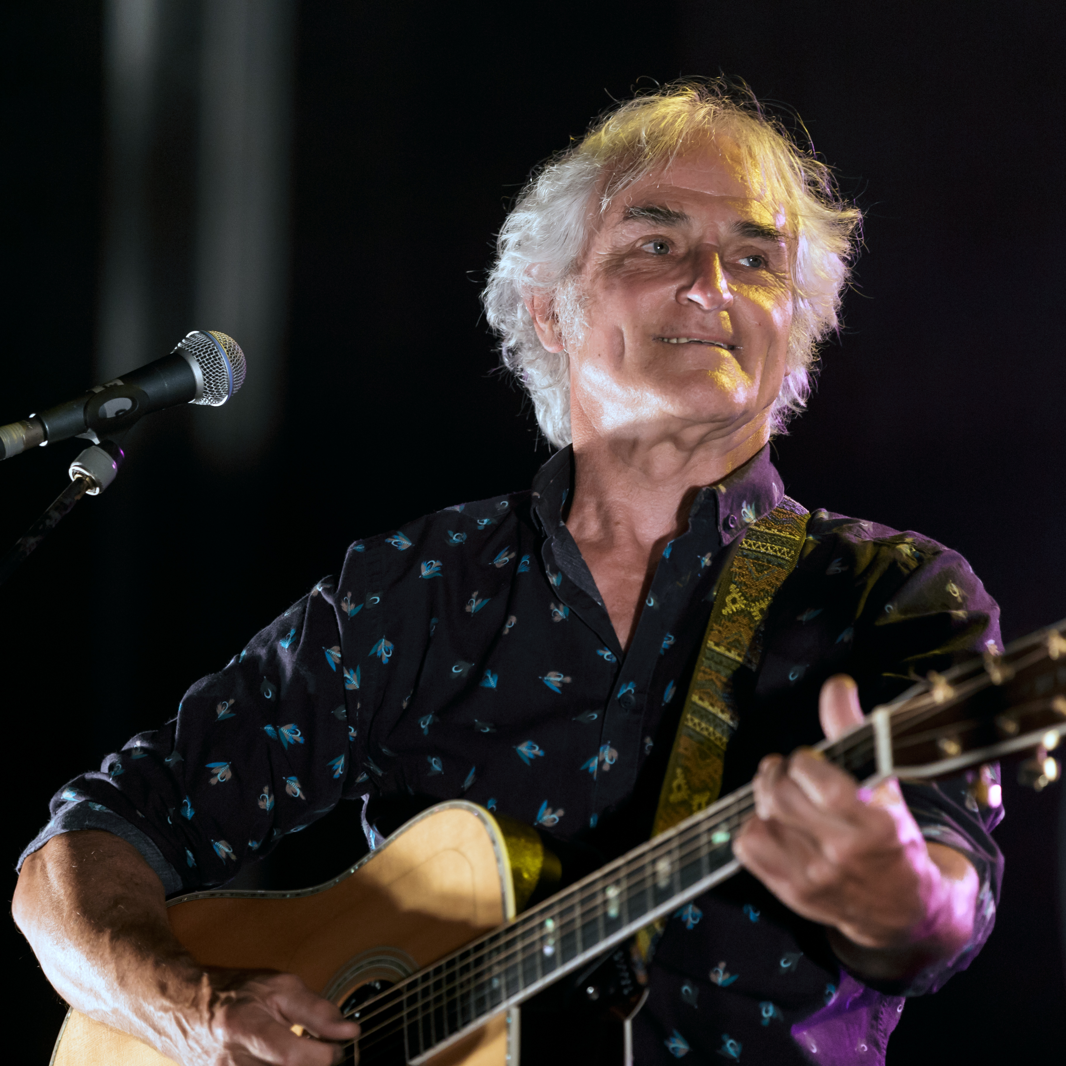 Gérard Delahaye avec le Trio EDF en concert au festival de Cornouaille à Quimper le 23 juillet 2016.